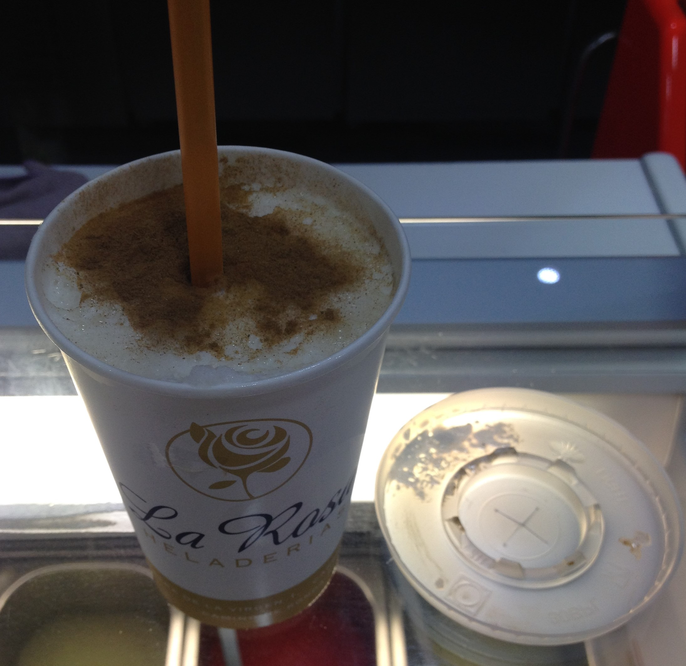 Fotografía de un vaso de granizado de leche rizada espolvoreado con canela